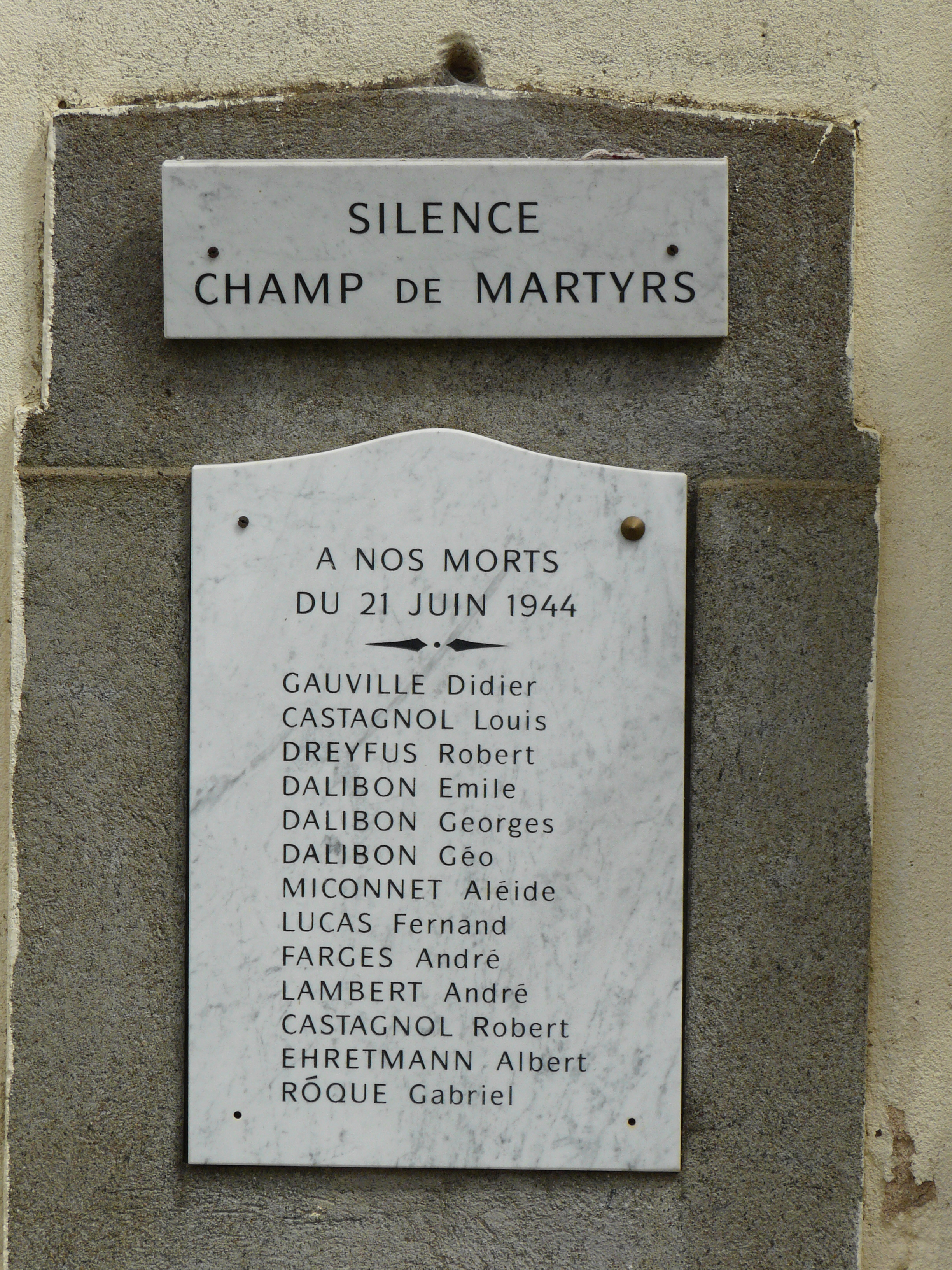 Champ des martyrs du 21 juin 1944, Pressignac, Pressignac-Vicq, Dordogne, France.